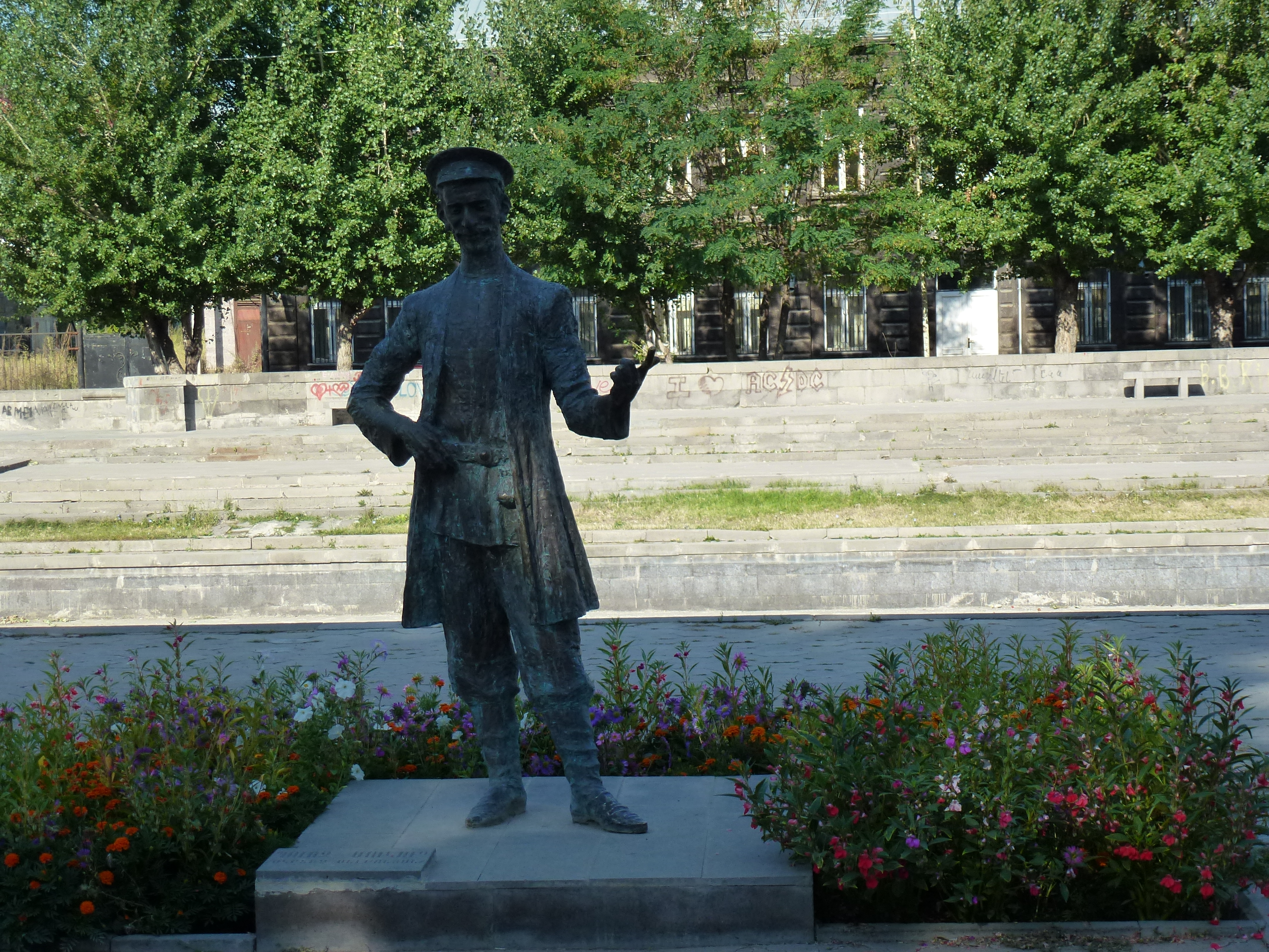 Պոլոզ Մուկուչի արձանը Գյումրիում 1/4